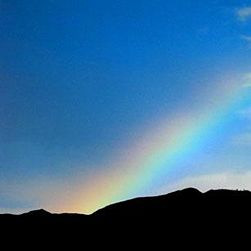 El arco iris es el símbolo moderno del movimiento noájida